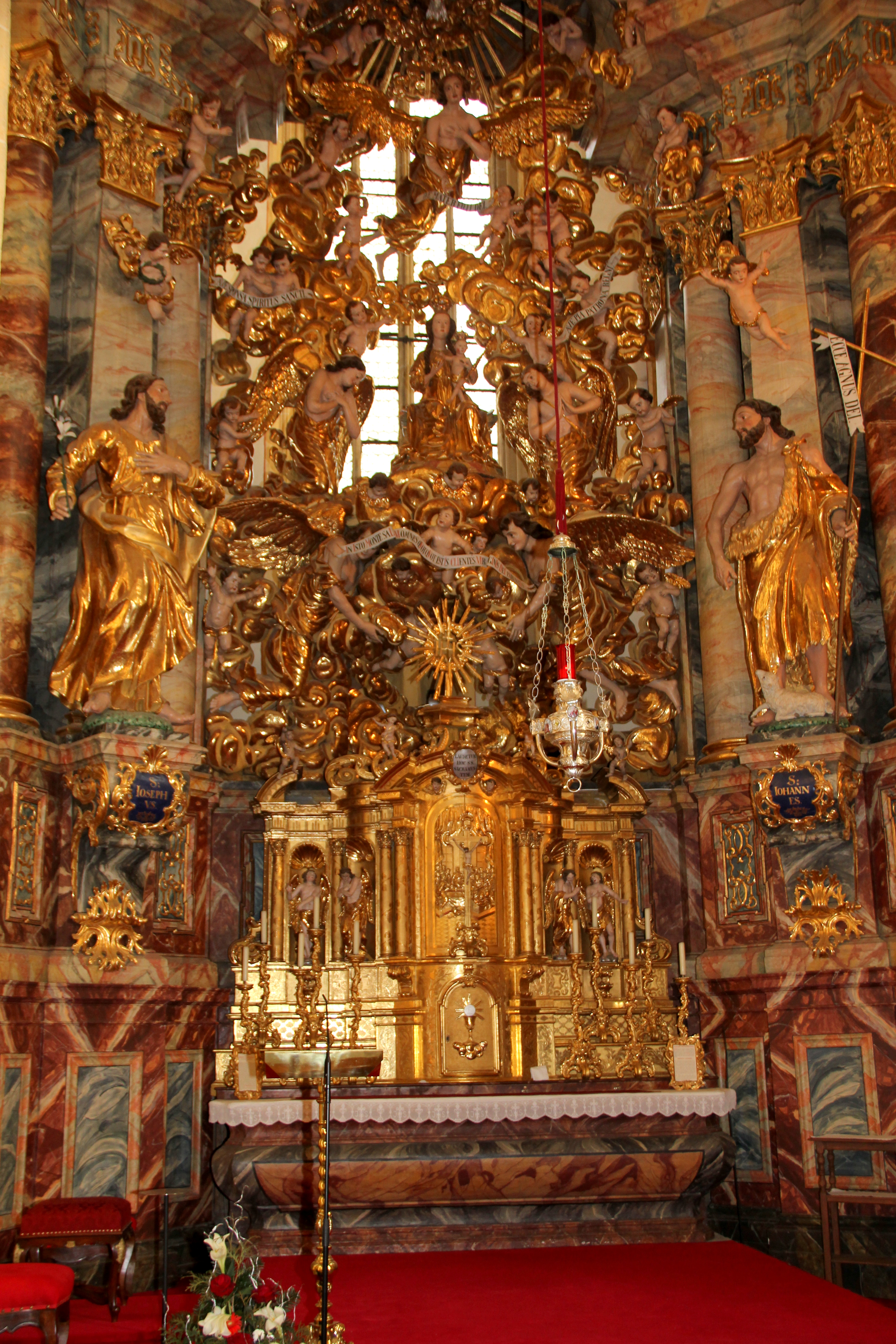 Kath. Pfarr- und Wallfahrtskirche hl. Maria Pöllauberg